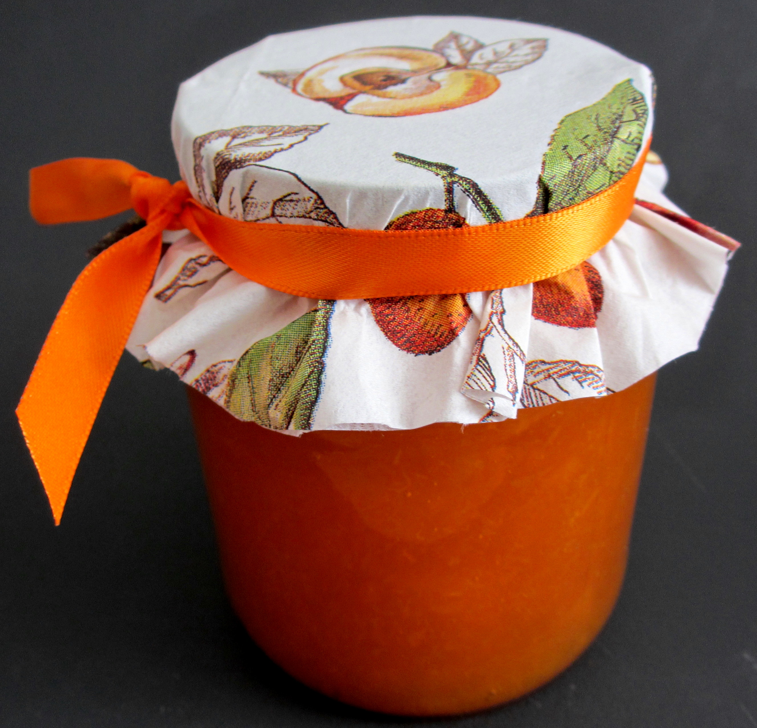 Hausgemachte Aprikosenkonfitüre, hergestellt aus 2 kg Aprikosen aus Frankreich, gekauft in Bad Segeberg, zubereitet mit 1 kg Extra Gelierzucker 2:1 von Dr. Oetker, gekauft in Stockelsdorf. Obst zerkleinert mit 34-cm-Edelstahlmesser, vertrieben von TCM, auf Ikea-Schneidunterlage Drälla, hergestellt in Indien (zugleich Fotohintergrund), püriert mit Philips-Pürierstab HR 1380/A, designed in Austria, gekocht in Fissler-4-Liter-Topf original-profi collection® auf AEG-Herd. Konfitüre abgefüllt mit WMF-Kelle in wiederverwendetem Glas mit Schraubverschluss von HAK Verdi Lebensmittel Groß- und Einzelhandel GmbH in Feuerbach (Baden-Württemberg). Glas dekoriert mit Ausschnitt aus Papierserviette von Villeroy & Boch (vermutlich Dekor Cottage) und aprikotfarbenem Satinband unbekannten Herstellers. Köchinbegleitende Getränke: Cataratto/silcilia bianco 2012, Solluna, I-91020 Salapartua (vino biologico), Abfüller Wein Werke Bremen; Mineralwasser Fürst Bismarck Quelle Classic, Aumühle.